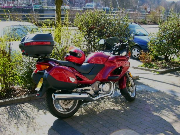 Honda Deauville (foto van Paul Hermans)